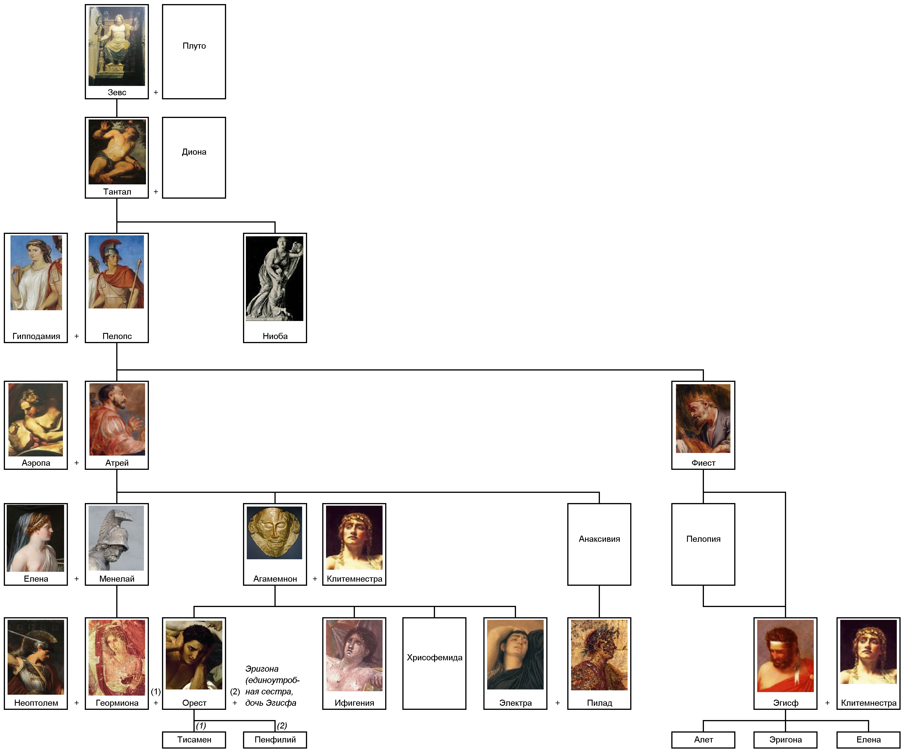 Танталиды, Атриды. Генеалогическое древо